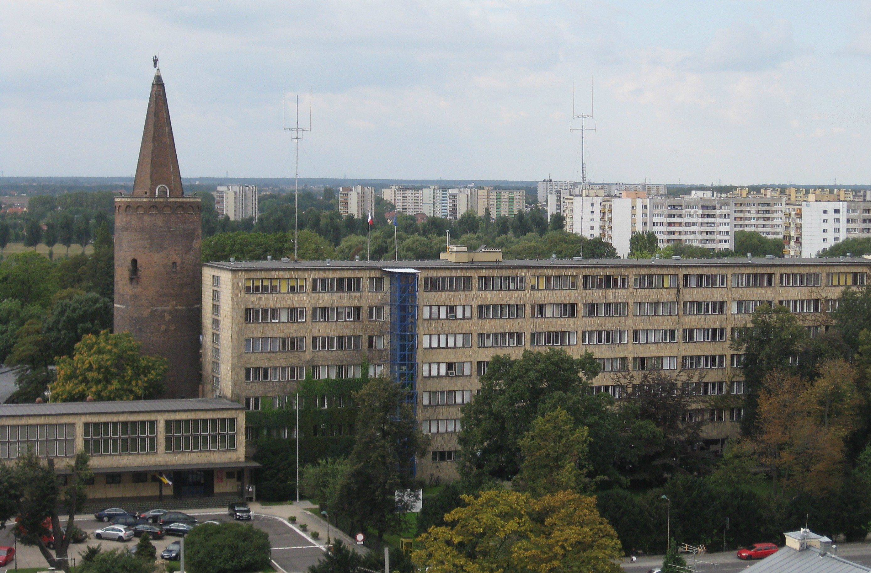 Piastenturm+Regierung